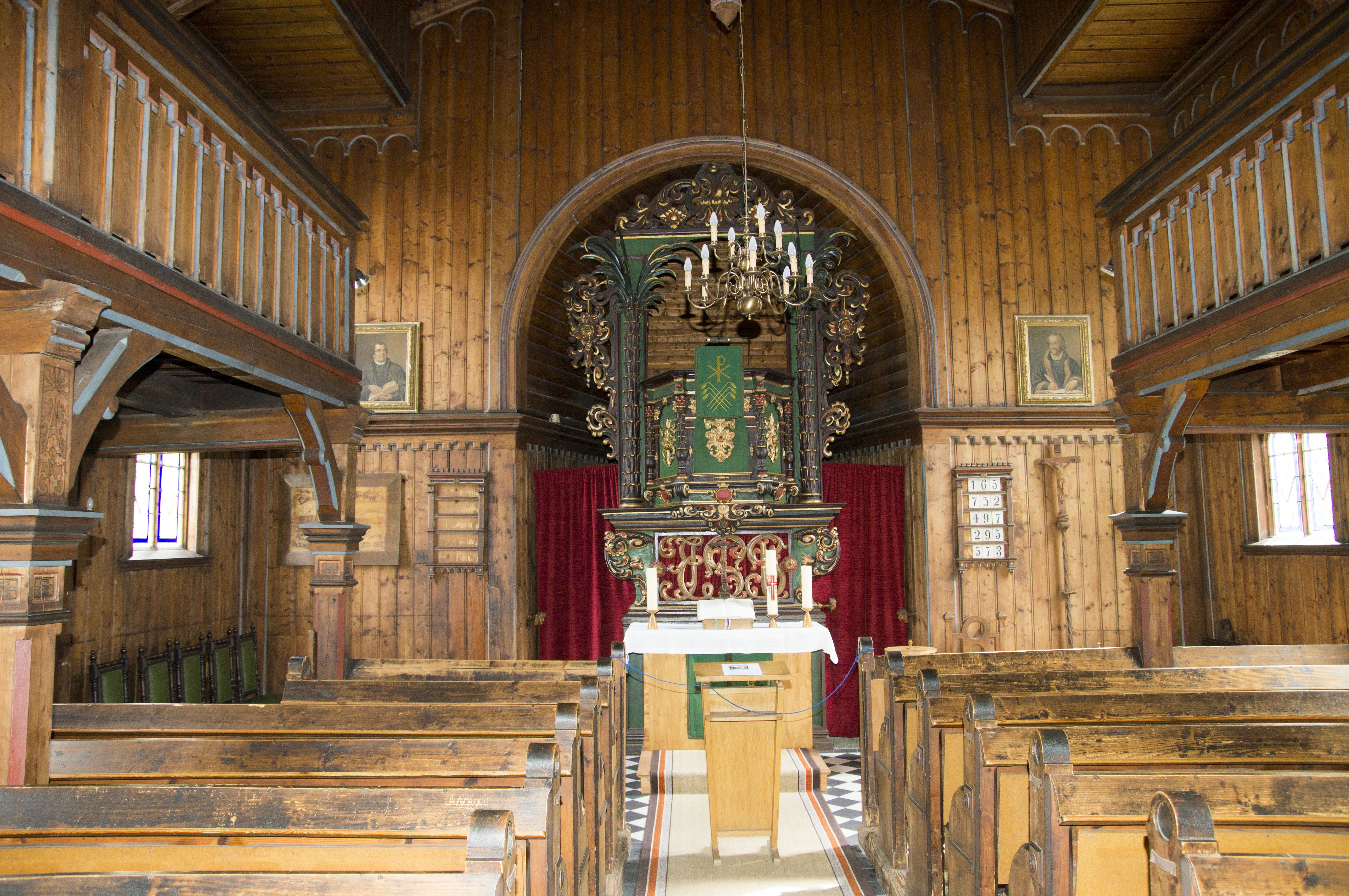 Innenansicht der Talkirche von Schwarzburg.